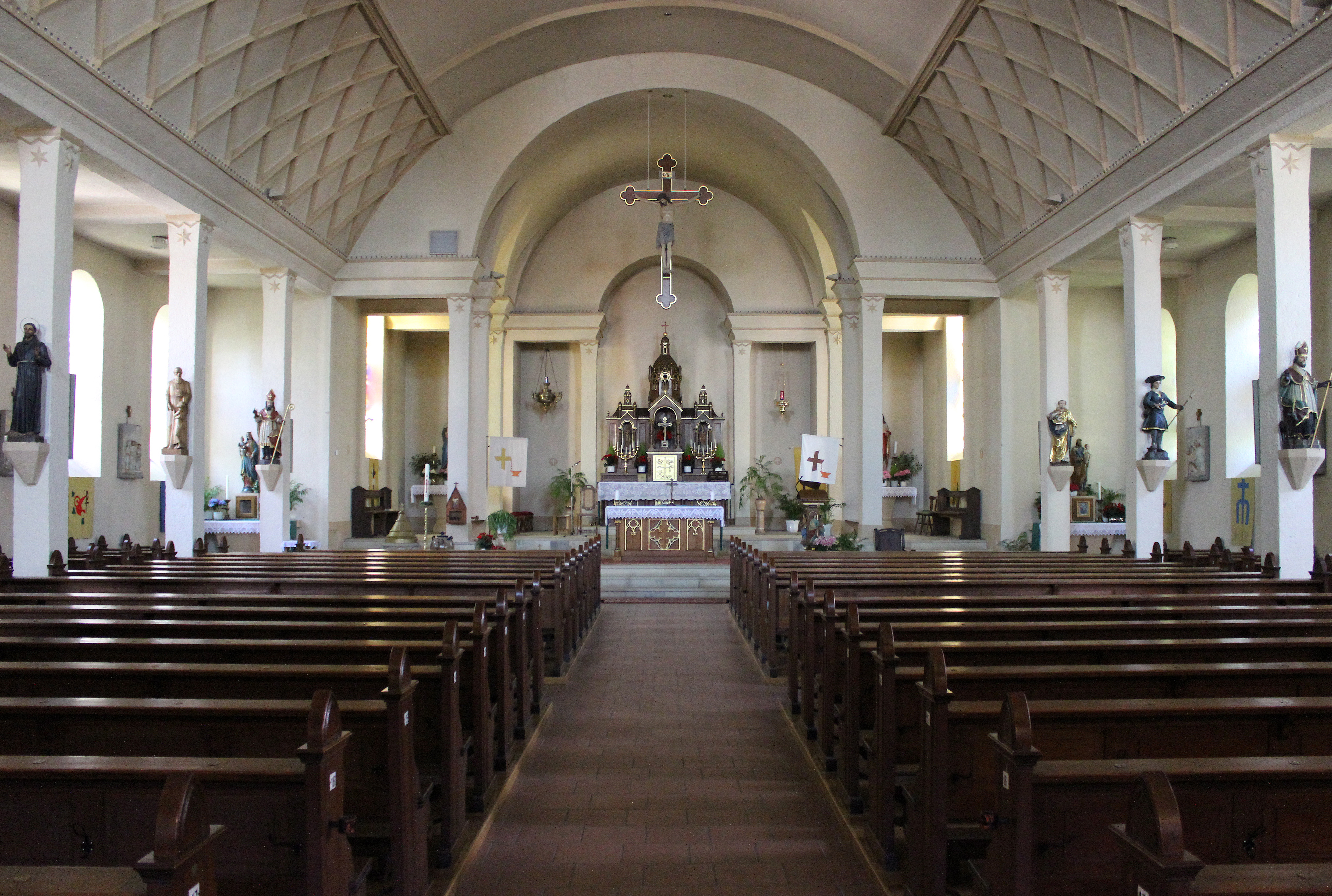 Blick ins Innere der katholischen Pfarrkirche St. Martin in Ittersdorf, einem Ortsteil der Gemeinde Wallerfangen, Landkreis Saarlouis, Saarland